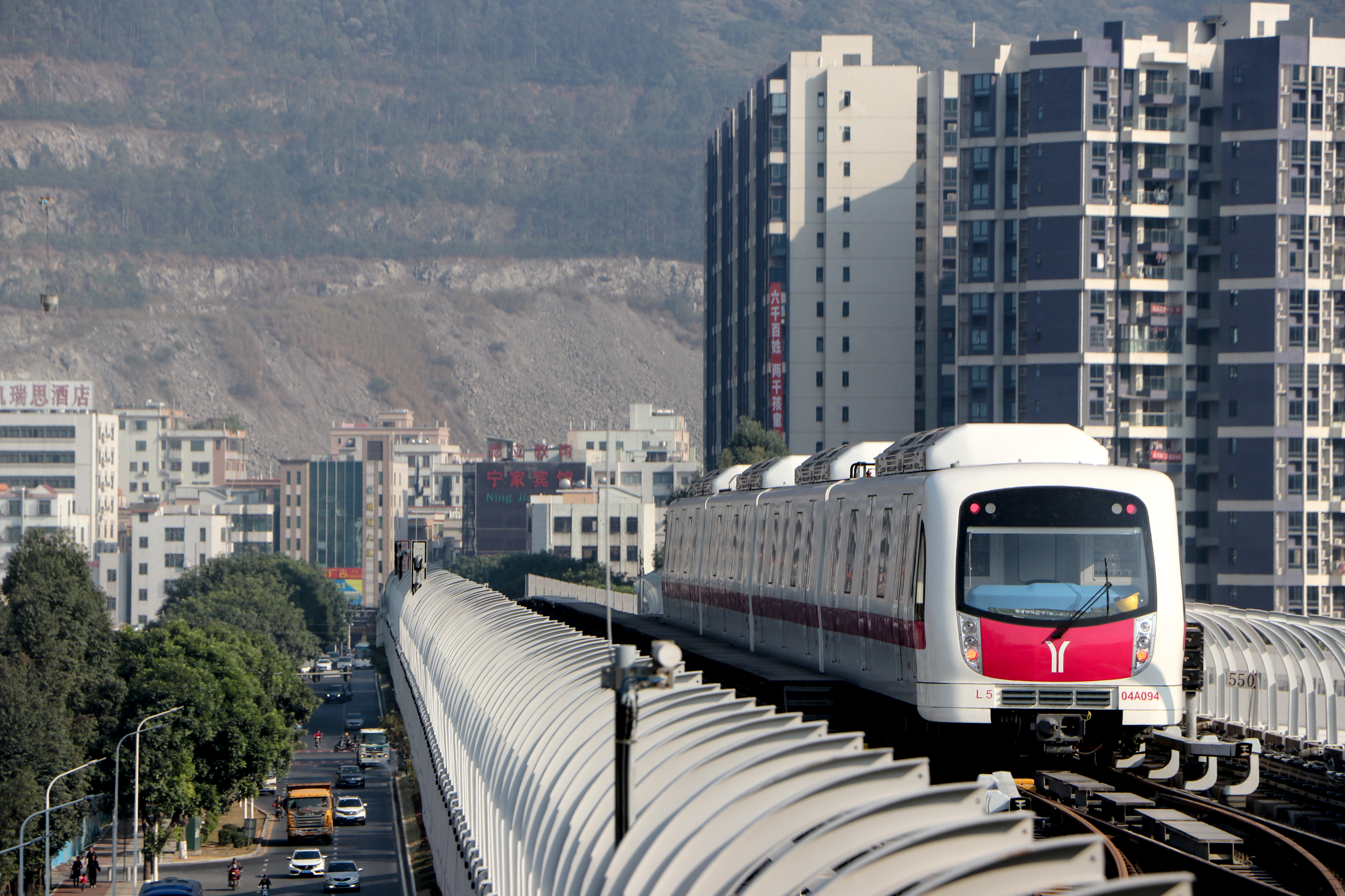 广州地铁4号线